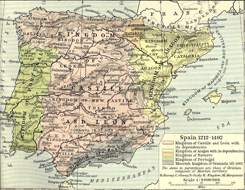 España de 1212 a 1492